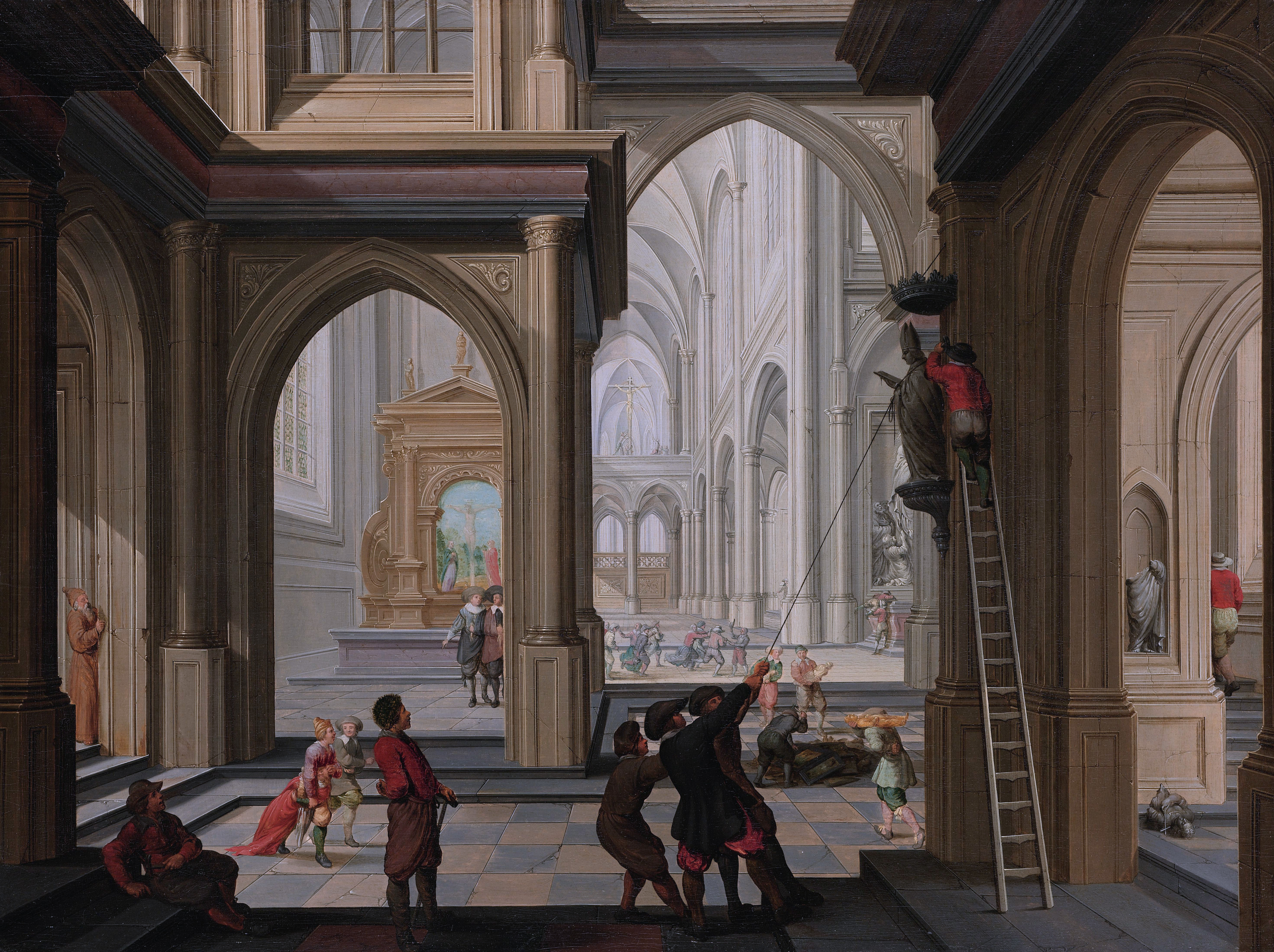 The Beeldenstorm